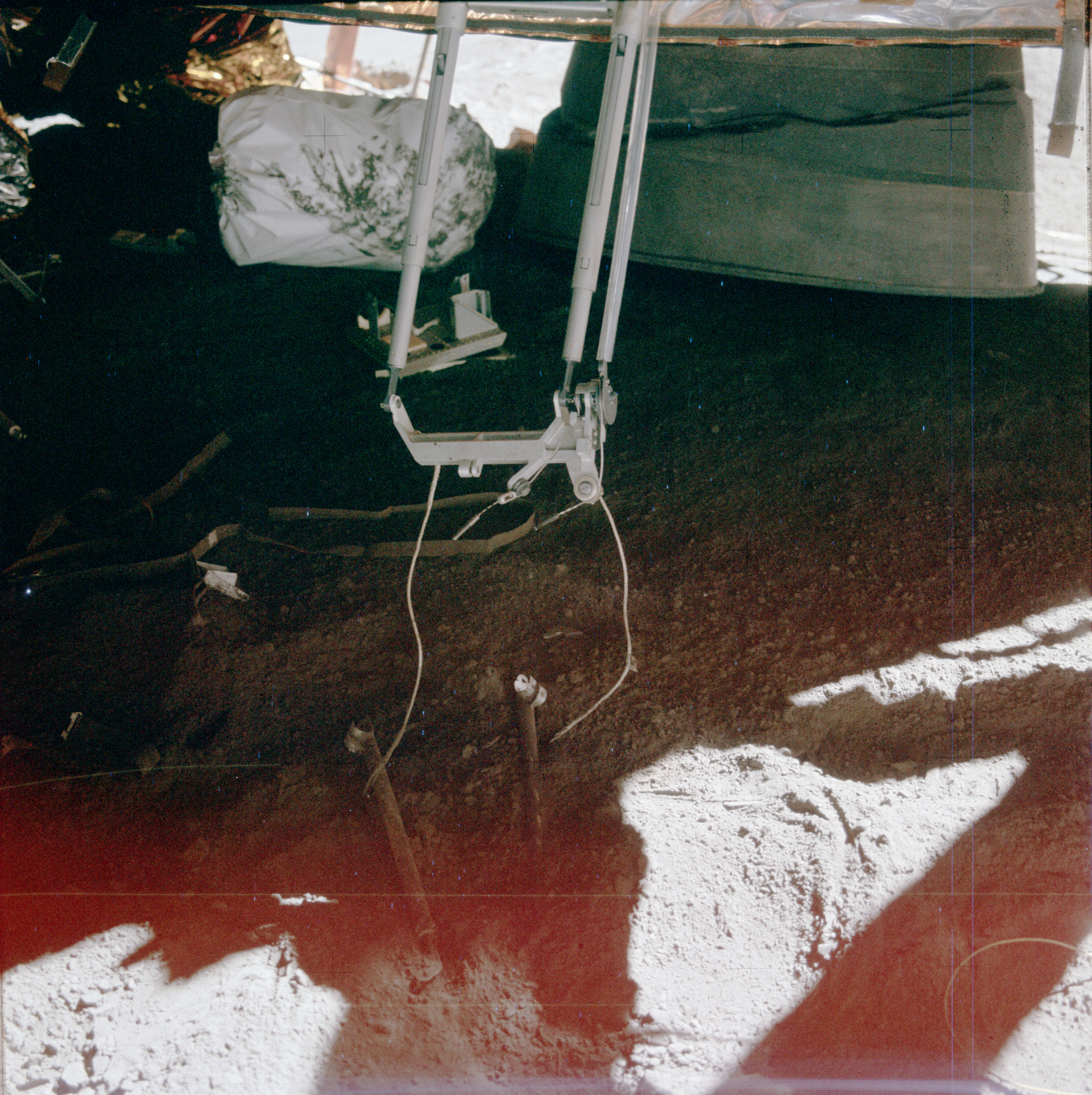 Falcon's descent stage engine bell buckled